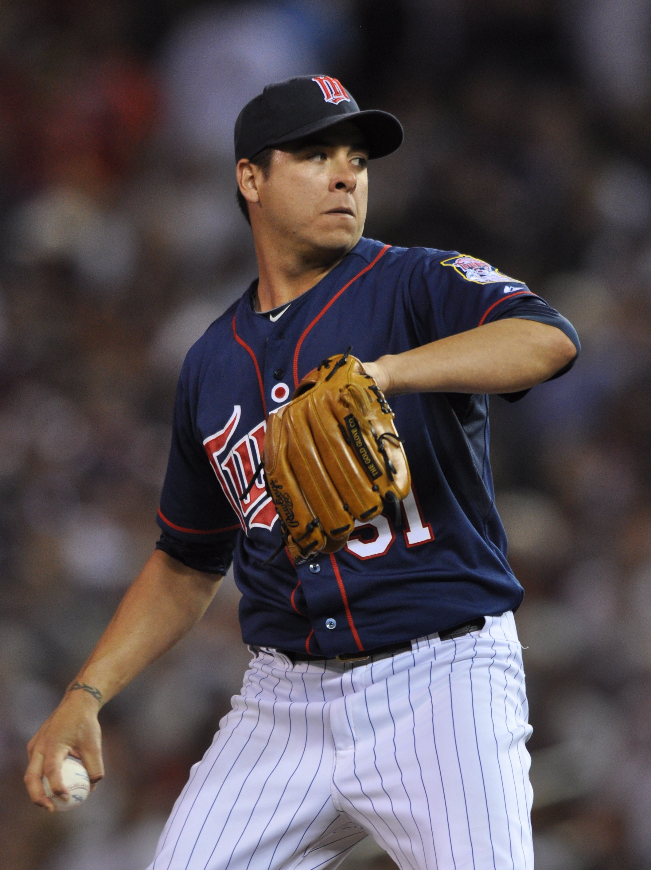 Anthony Swarzak